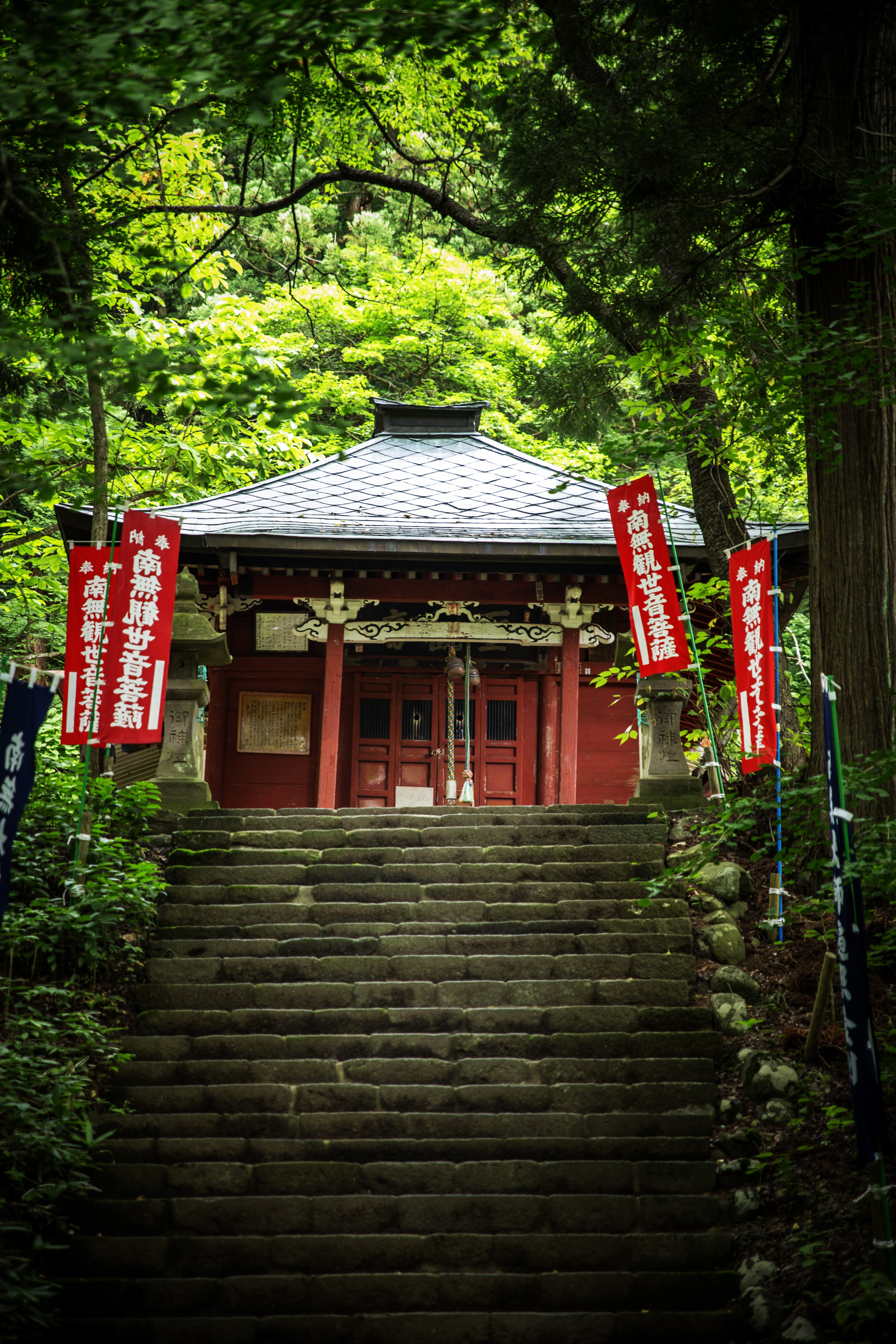 久度寺観音堂